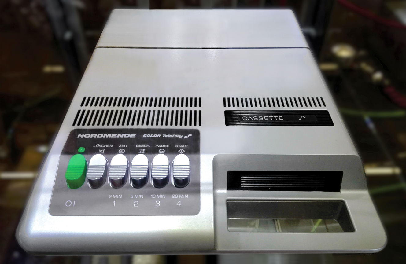 Videoconsola: Nordmende Color Fairchild Generación: Segunda Origen: Alemania Año: 1980 Compañía: Nordmende Categoría: Cartucho